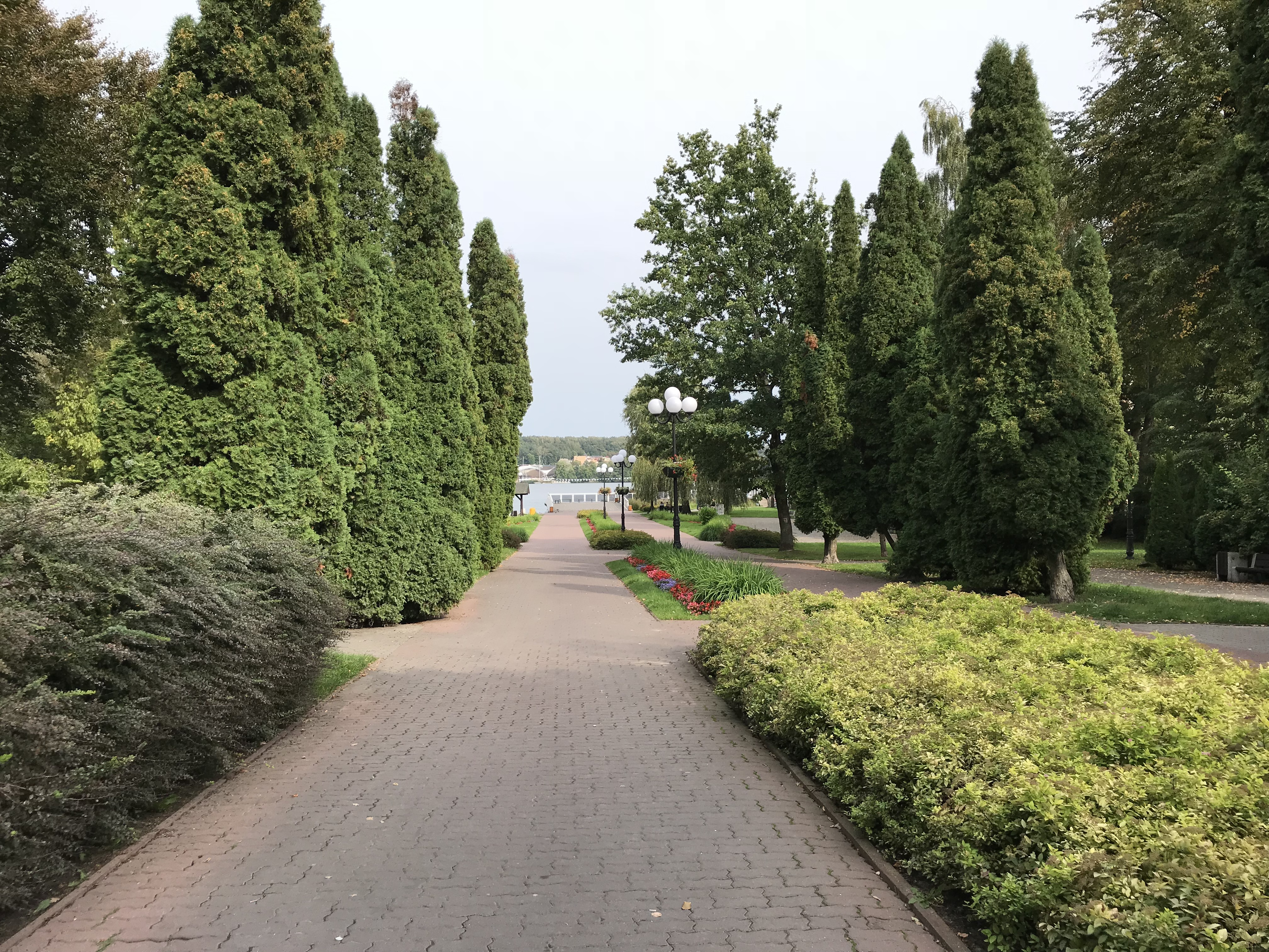 Mrągowo - dojście do Jeziora Czos od strony kościoła ewangelickiego